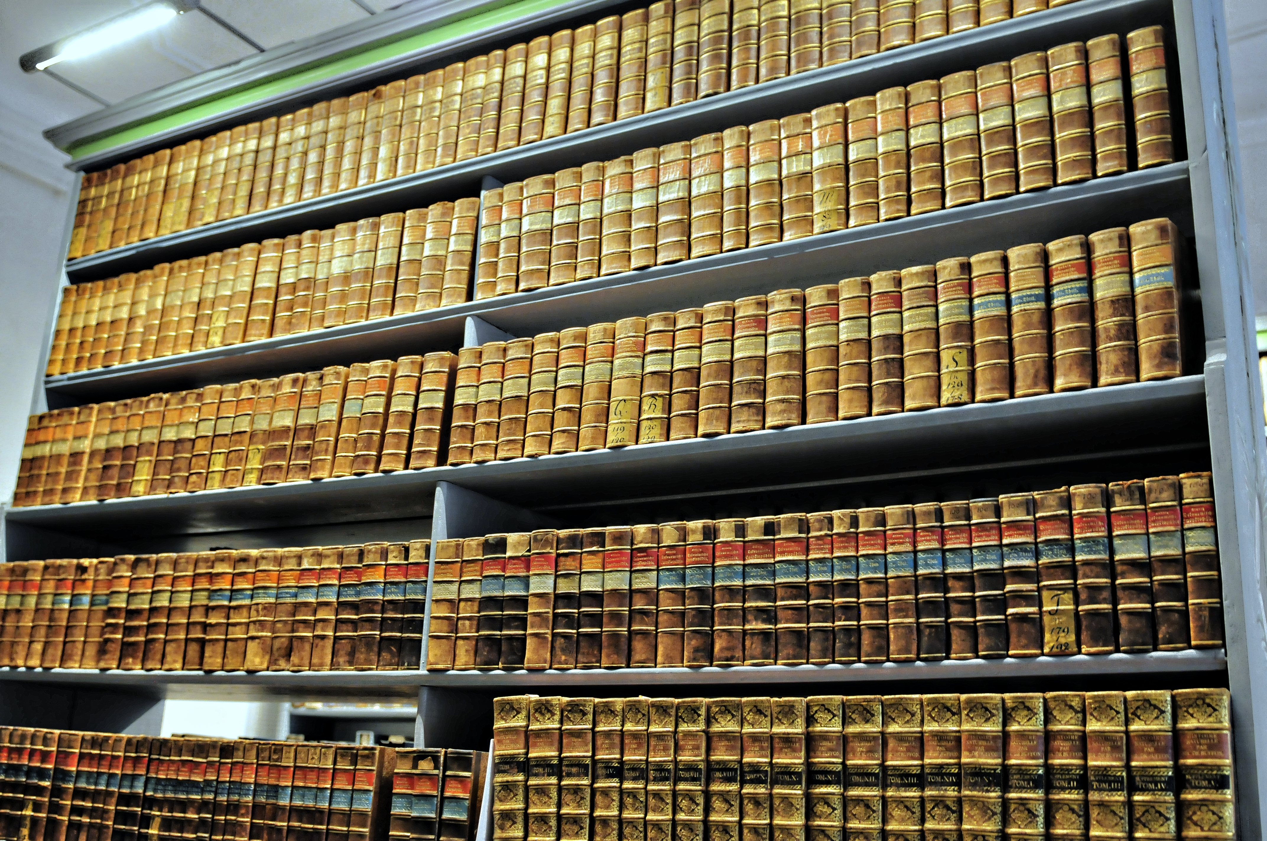 Oberlausitzische Bibliothek der Wissenschaften